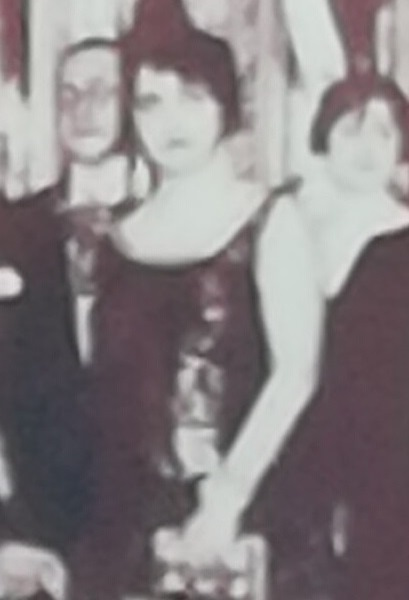 Laura Carbo Núñez en el baile inaugural de la Casa de los Presidentes. Quito, octubre de 1928.